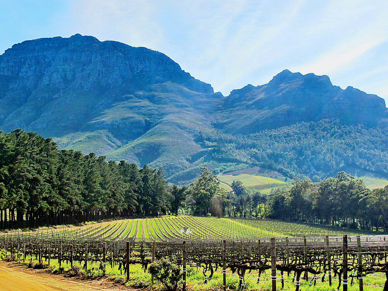 Vignoble de Stellenbosch